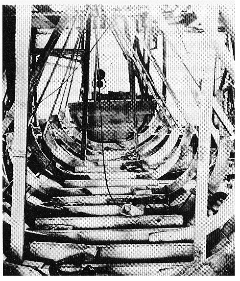 Dwars to'n Kiel liggt de Boddenwrangen; daran sünd de Spanten fastmaakt. Dat Bild is up de Deters-Werft upnahmen wurrn vun Theo Deters.